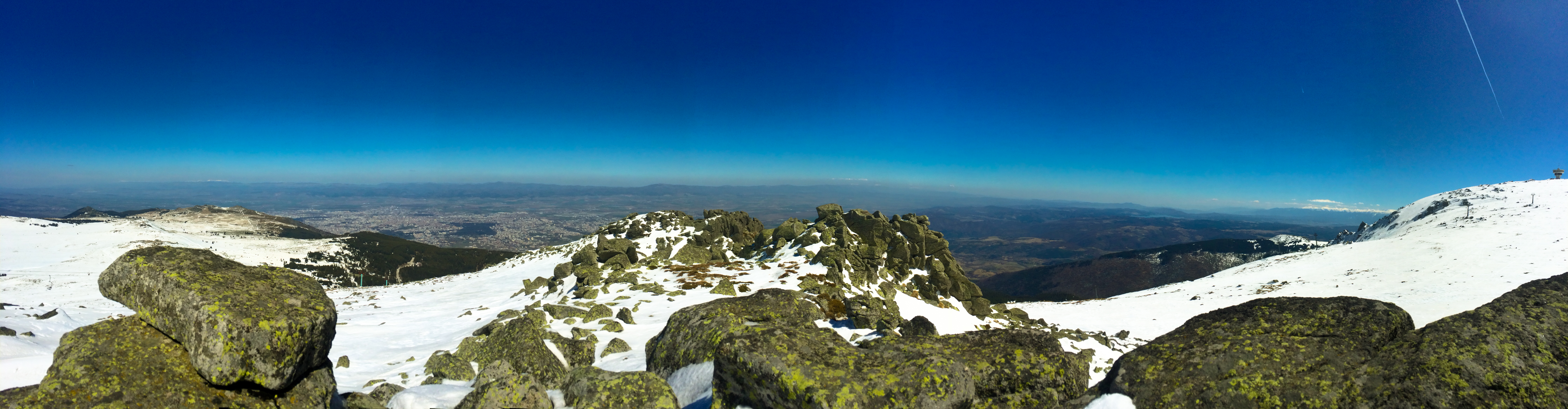 Изглед от Малък Резен в посока София.